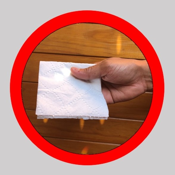 Uso ecológico del papel higiénico, usando sólo la cantidad óptima según capas y resistencia. Usando sólo 2 o 3 hojas dobladas según el tamaño de las hojas, en contraposición a la mala práctica del arrollado en la mano, con lo cual se desperdicia la mitad y se provoca la tala innecesaria de 70.000 árboles (2019) con un alto daño ambiental.